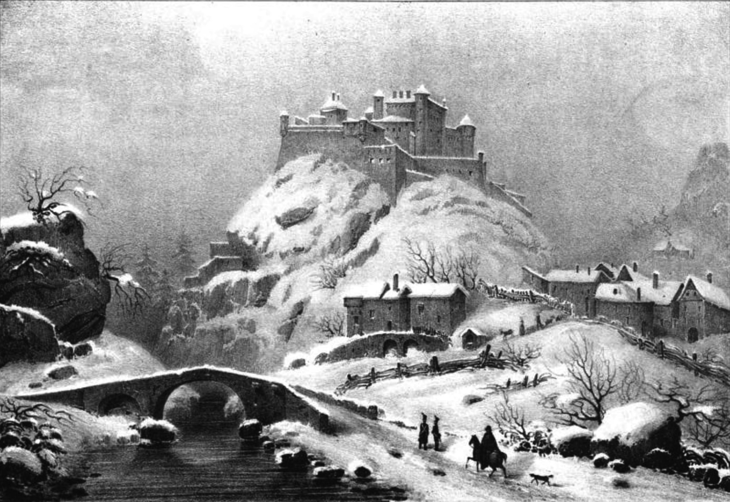 Album du Dauphiné - tome III, litographie de Chateau-Queyraz, Hautes Alpes